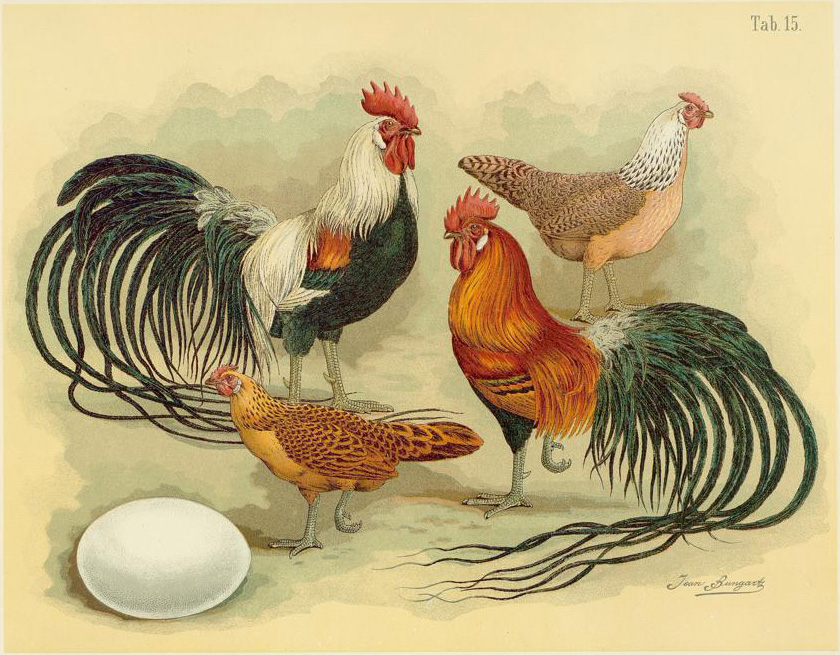 Phönix-Huhn. (Kuro sasa Oski.) Gallus. dom. renustus. Phönix-fowl.